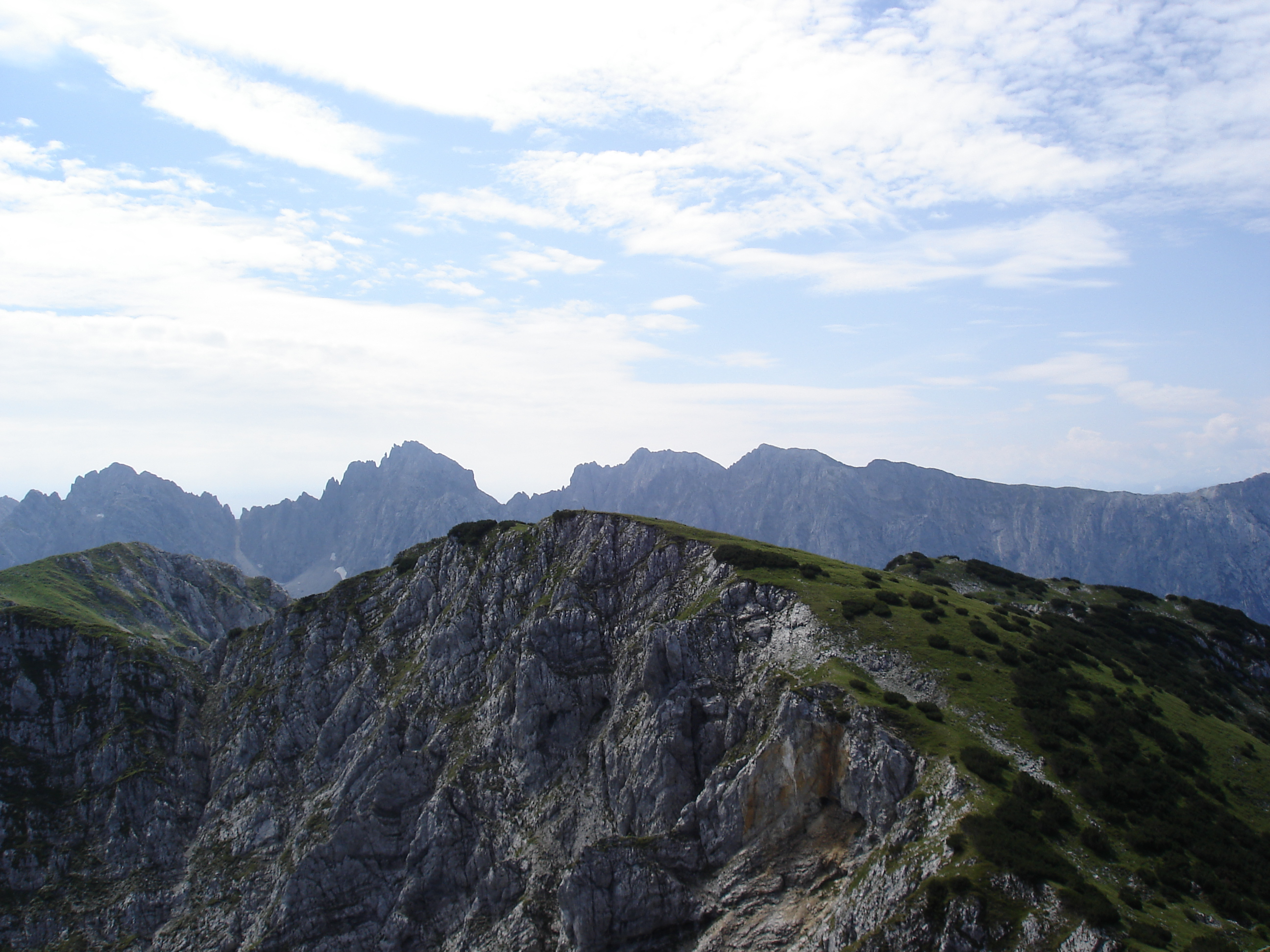 Vordere Kesselschneid, Kaisergebirge, Austria